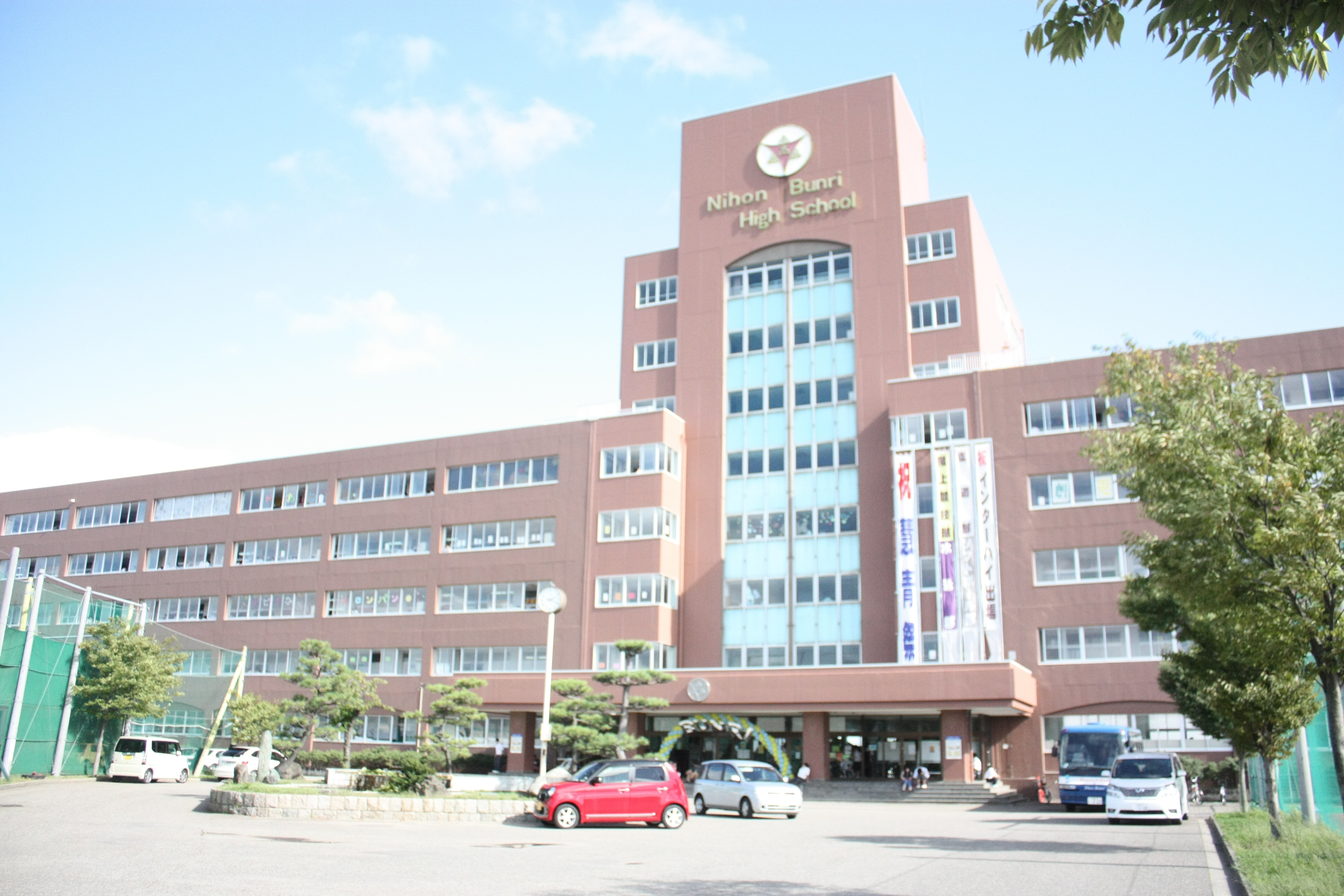 日本文理高校校舎です。晴天時に撮影しました